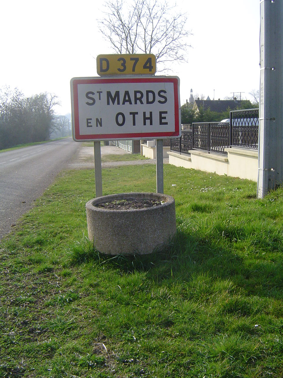 Saint-Mards-en-Othe - Panneau à l'entrée du village